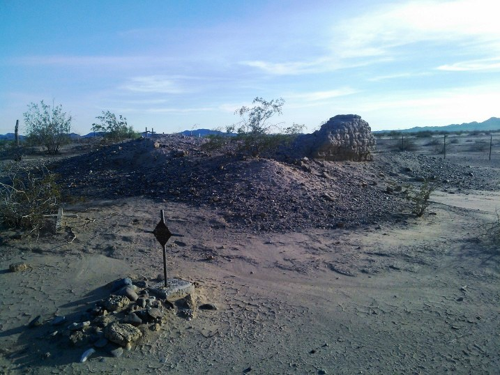 restos de la antigua capilla de la rancheria pima del Bisani